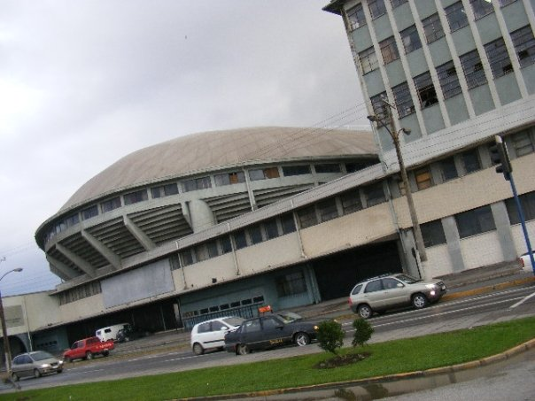 Gimnasio La Tortuga, Talcahuano.